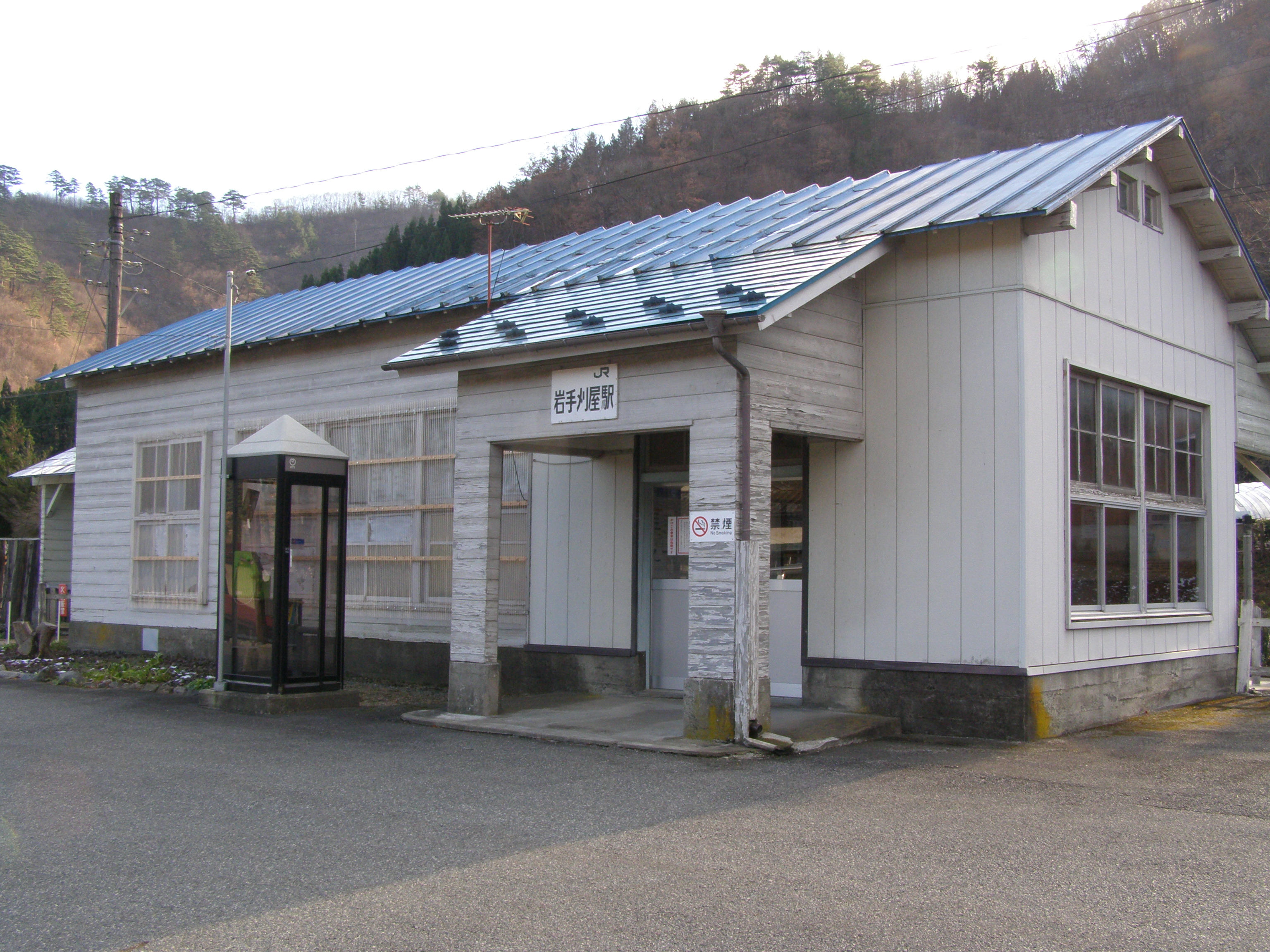 Iwate-Kariya Station, Miyako, Iwate, Japan